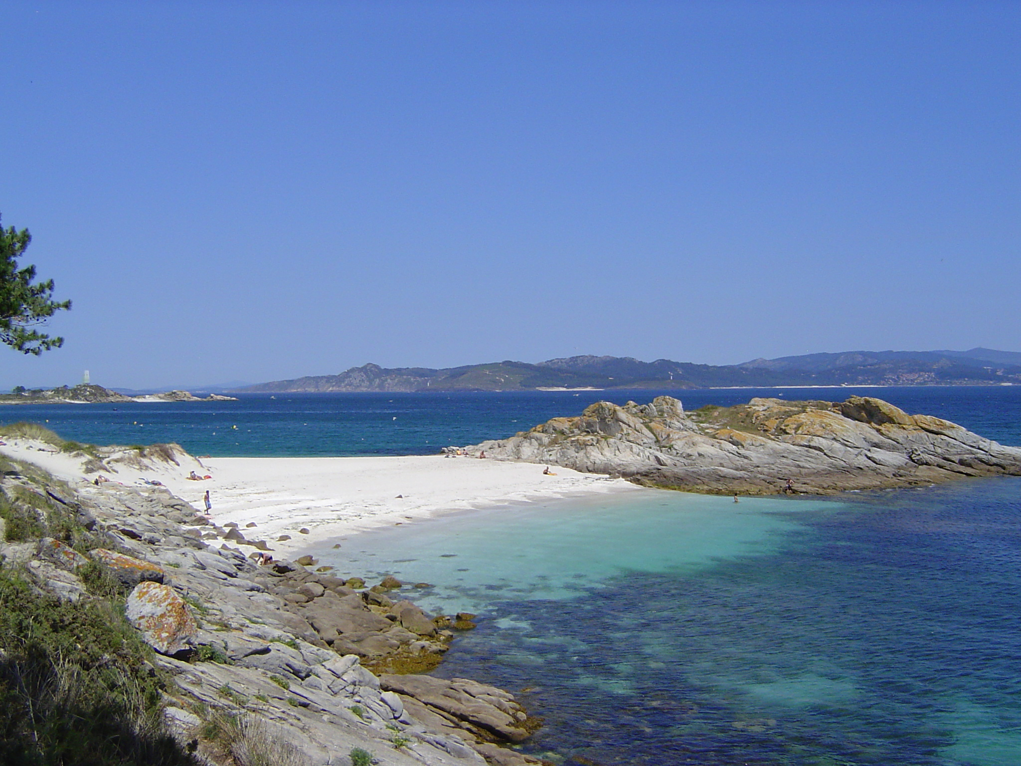 Imaxe dunha das praias das Illas Cíes